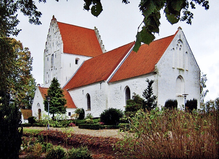 fra sydøst